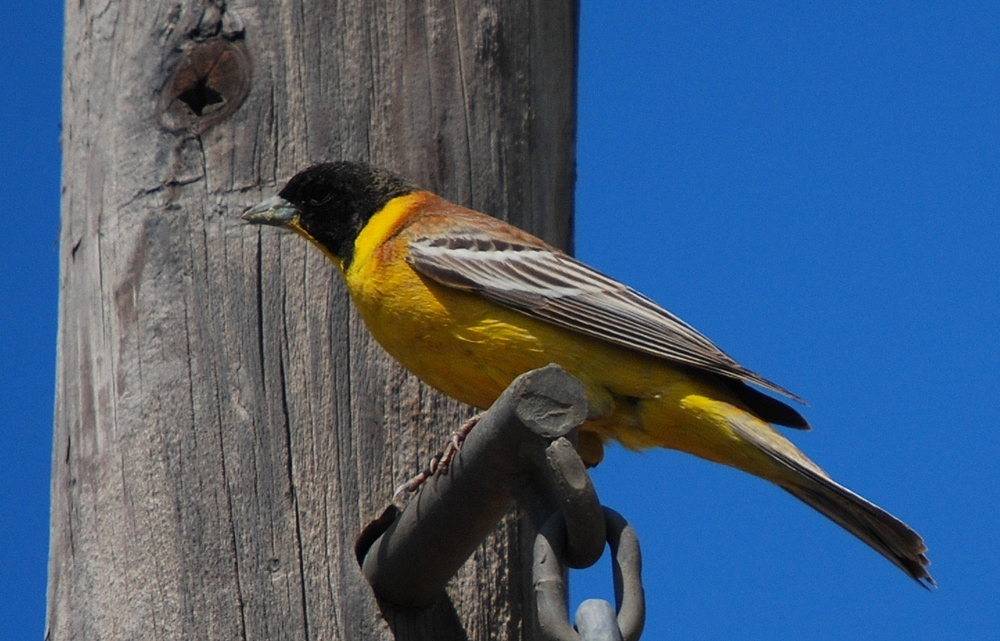 Kurdî: Li Sadiyê ya Baravan hatiye kişandin.